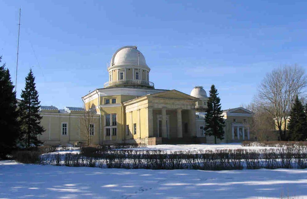 Pulkovo observatory (St.Petersburg, Russia)